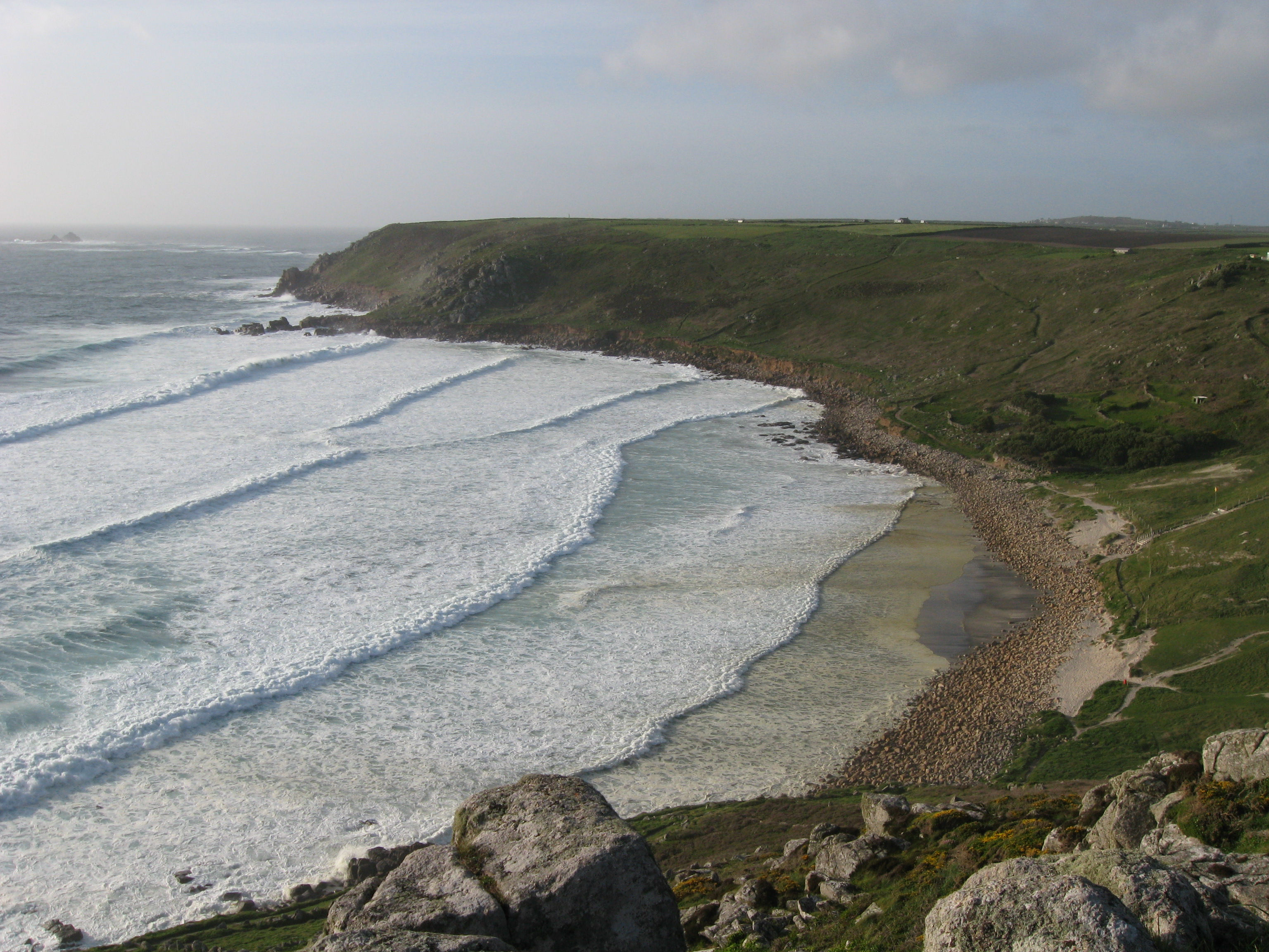 Gwynver Beach - high tide